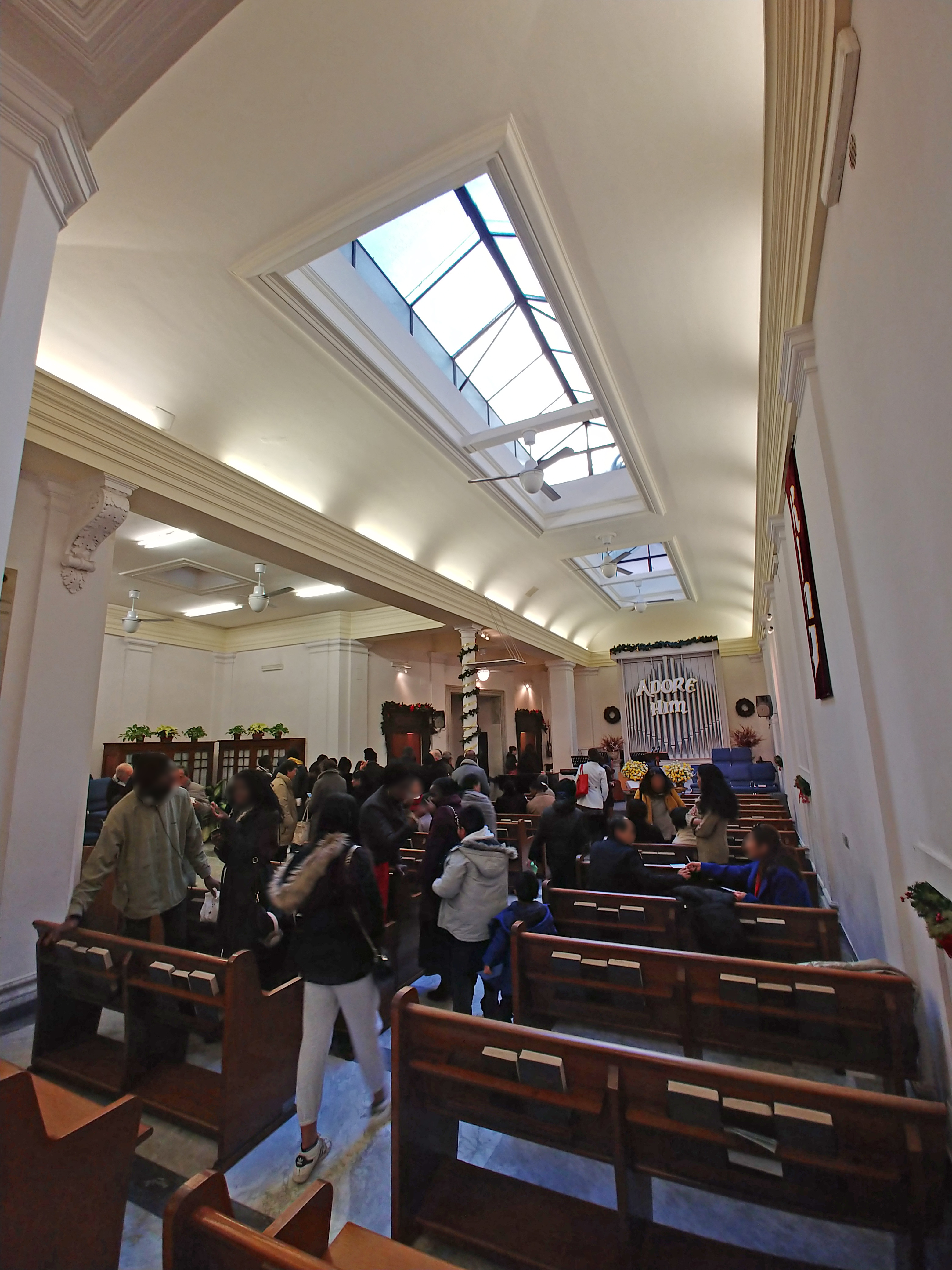 Interno dopo una funzione.